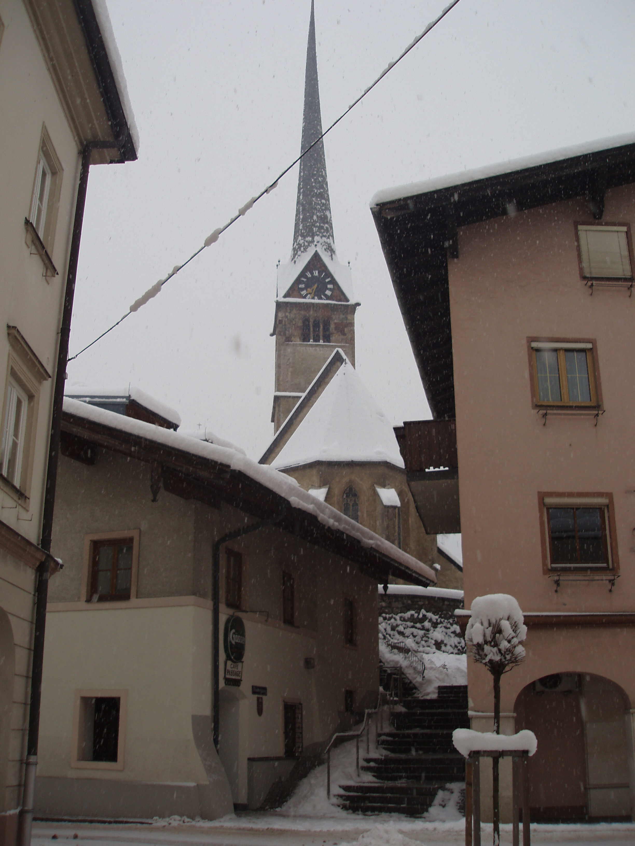 L'église à Bischofshofen.